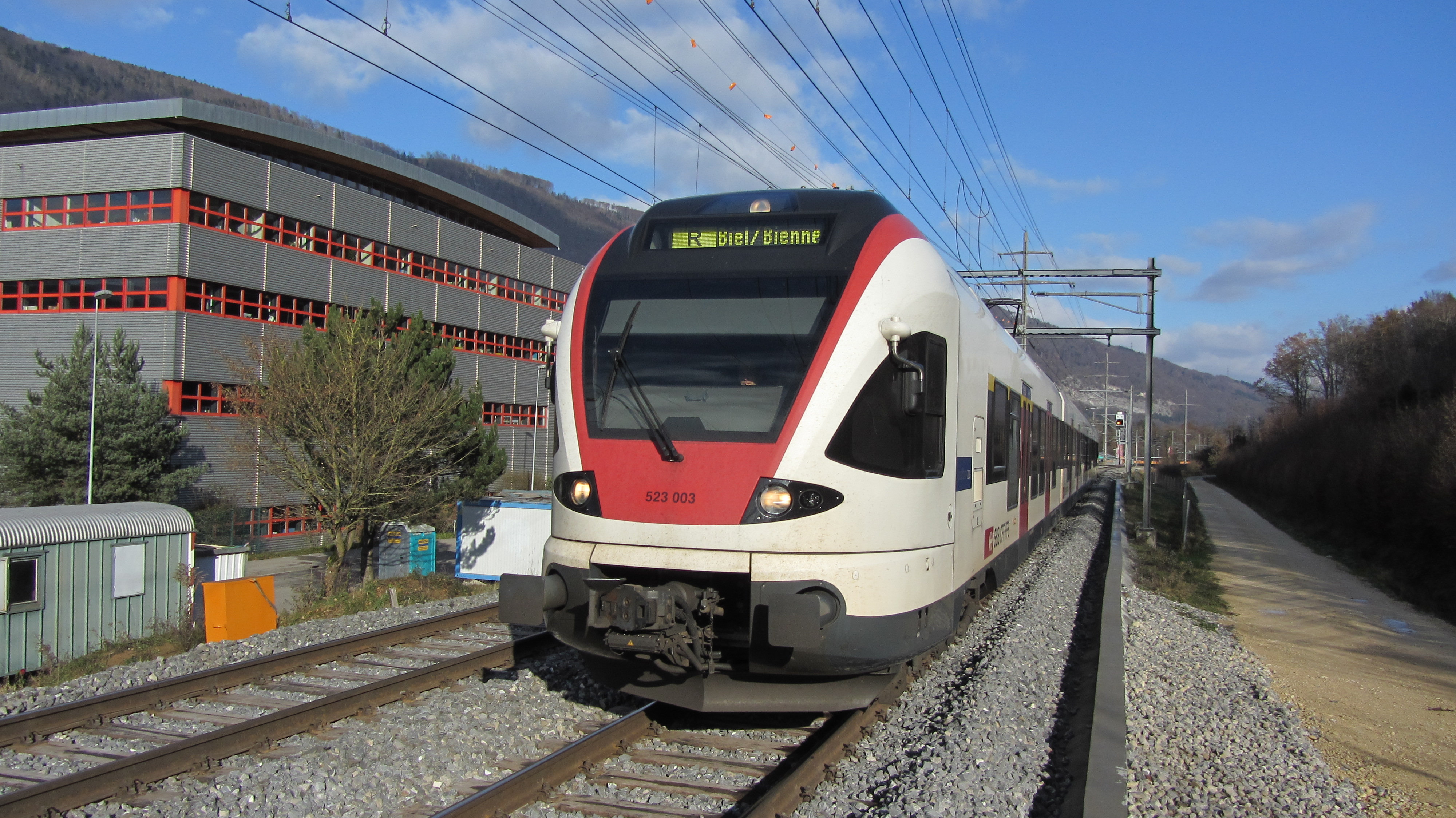 Flirt